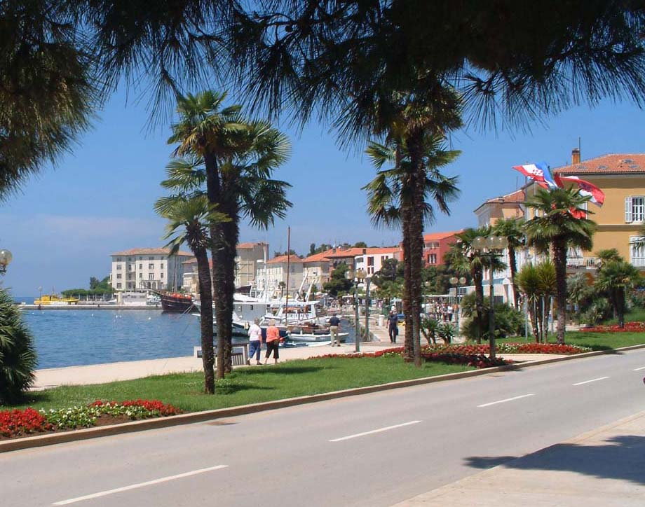 Poreč, Porec, Parenzo, - Croatia K. Korlevic